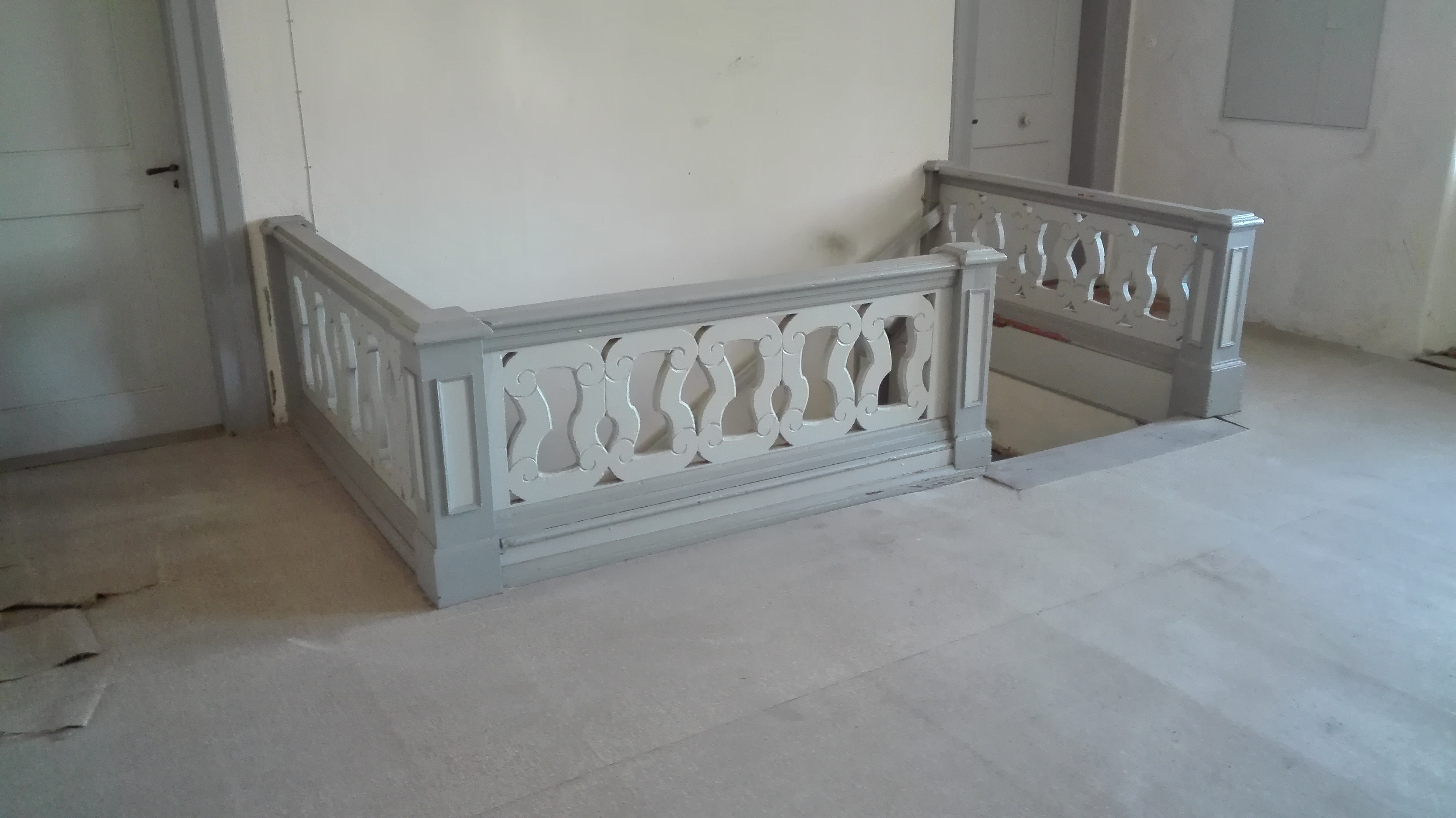 Barocktreppe, Allodium Cronheim